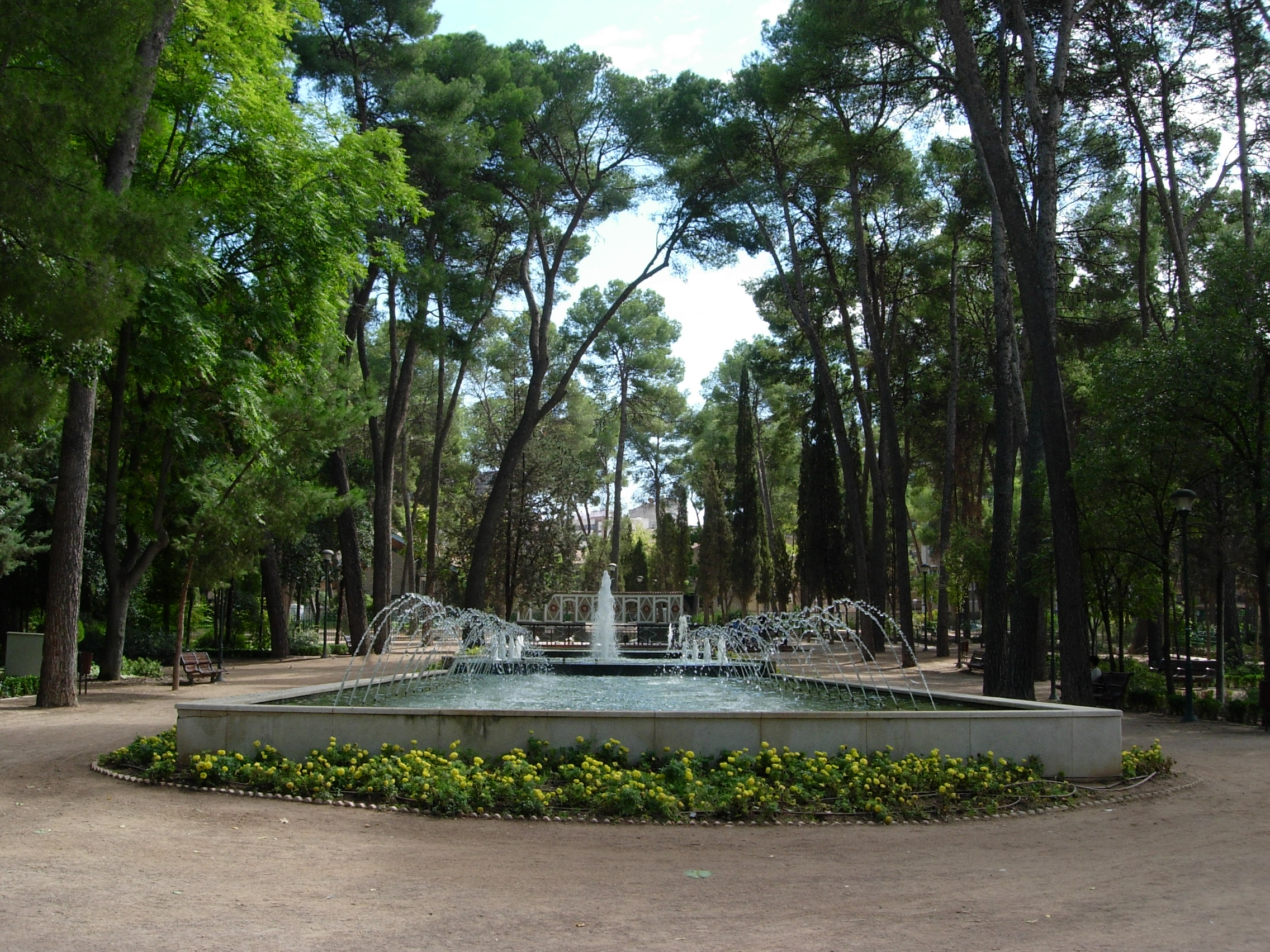 Fuente larga, en el Parque de Abelardo Sánchez de Albacete (España).